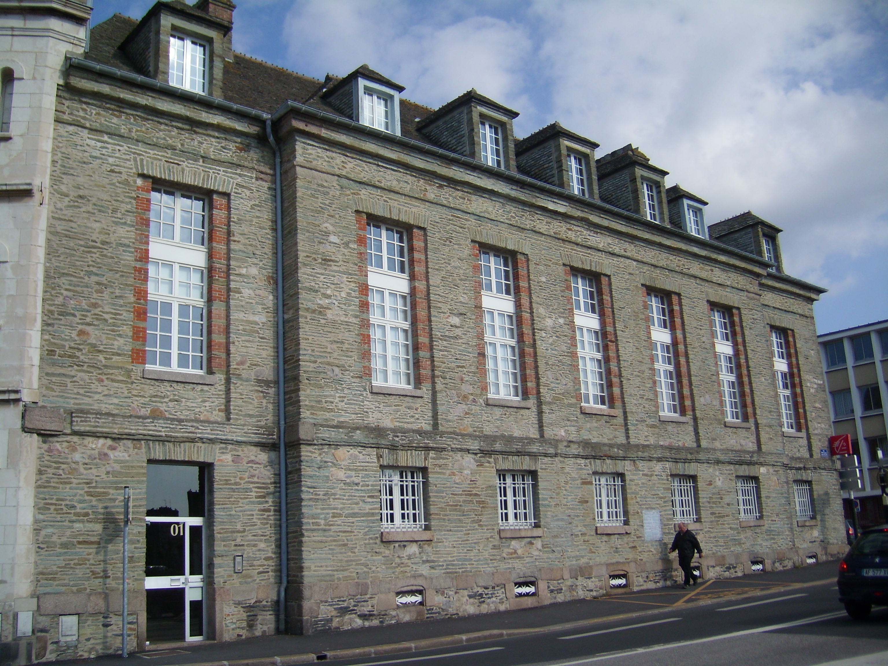 Hôtel Épron de la Horie (1781). Murs et toits en schiste bleu. Successiveent hôtel particulier, caserne, hôpital auxiliaire, hôtel des douanes, et aujourd'hui banque.